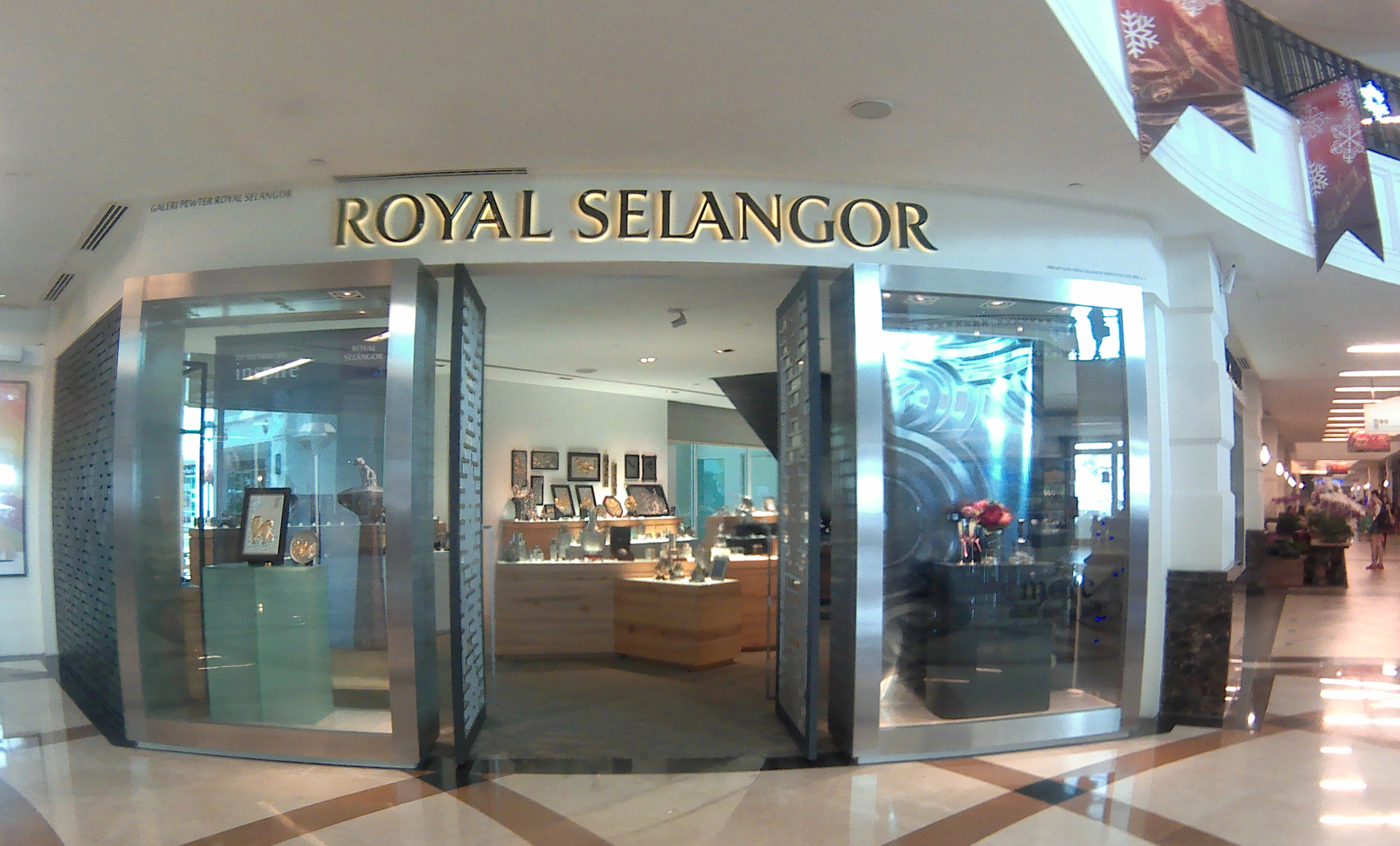 海峡岸广场内的皇家雪兰莪分行